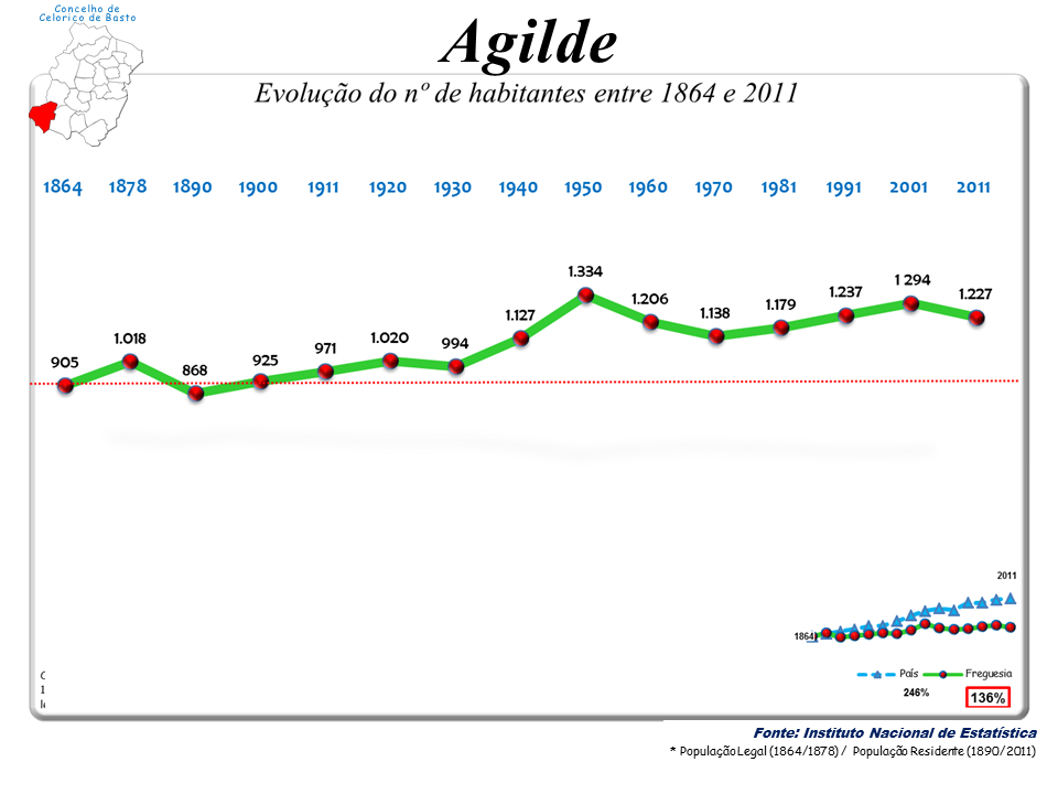 Censos 1864/2011